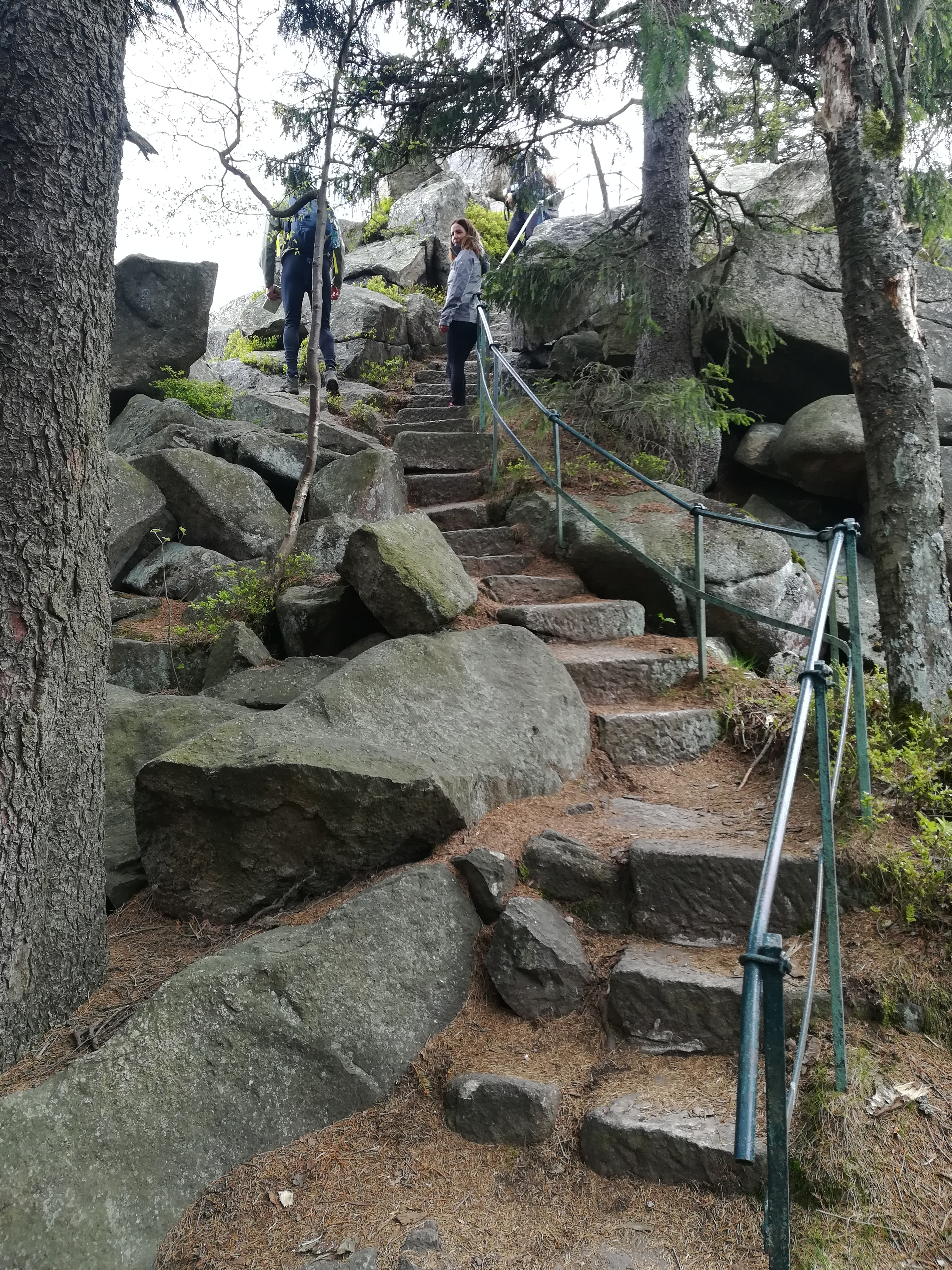 Ostra Mała (Skalnik) - Rudawy Janowickie.